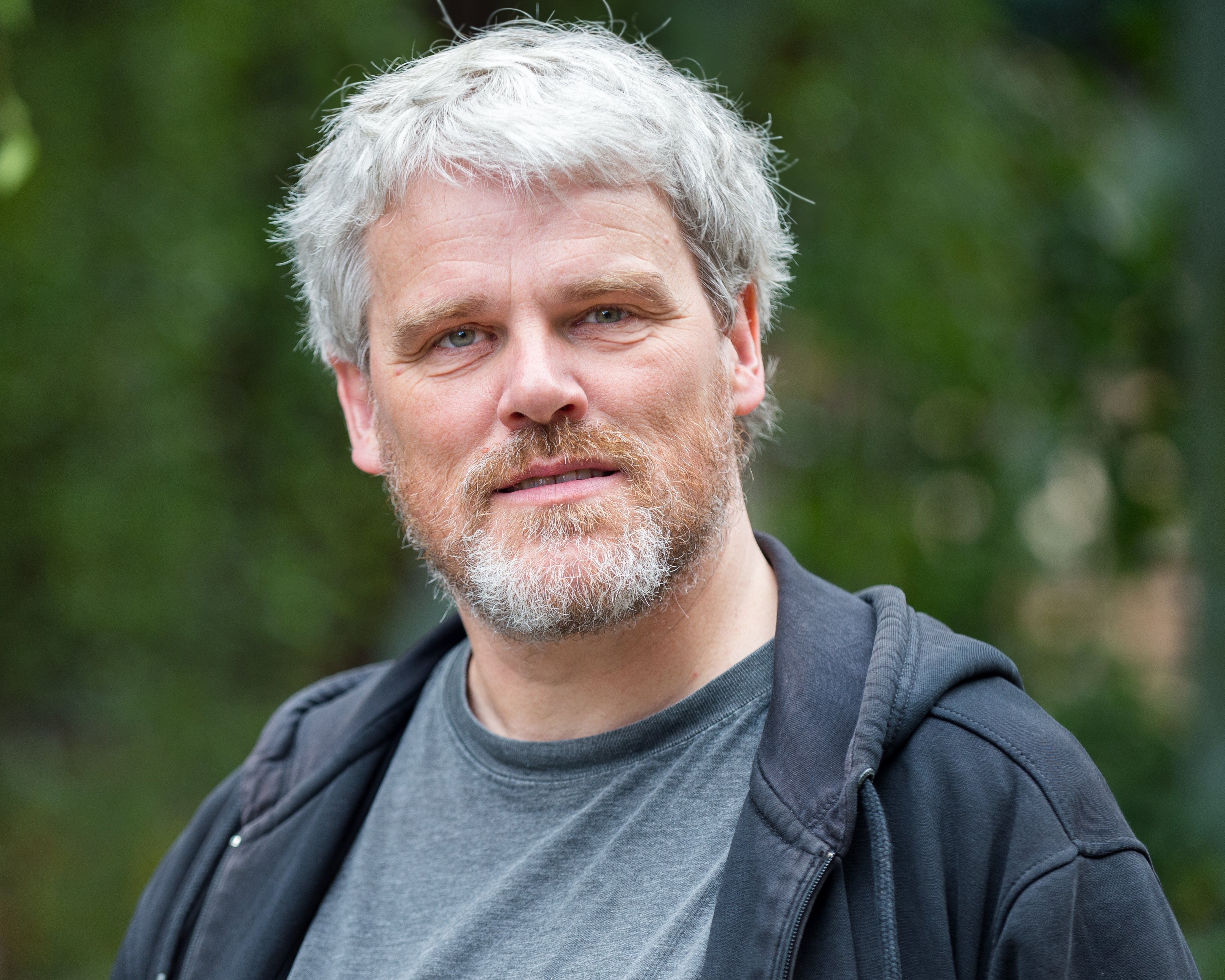 Umweltaktivist und Atomkraft-Gegner